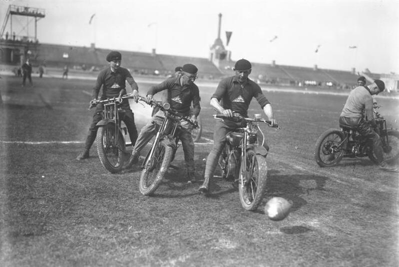 Motorradfussball, ein neuer Sport in Deutschland! Ein interessanter Moment aus einem deutschen Motorrad-Fussball-Spiel.